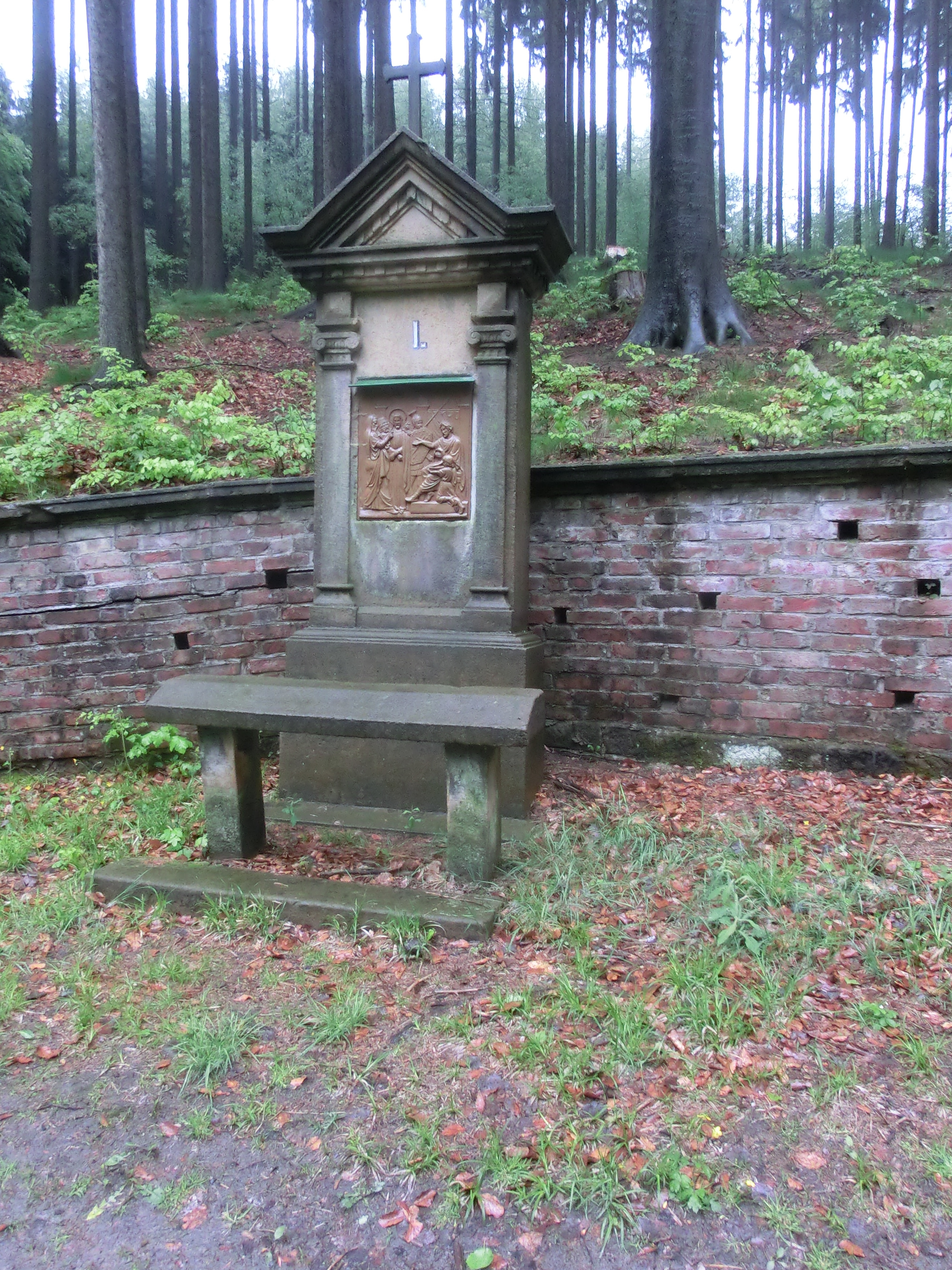 Suchý Důl, Ticháčkův les